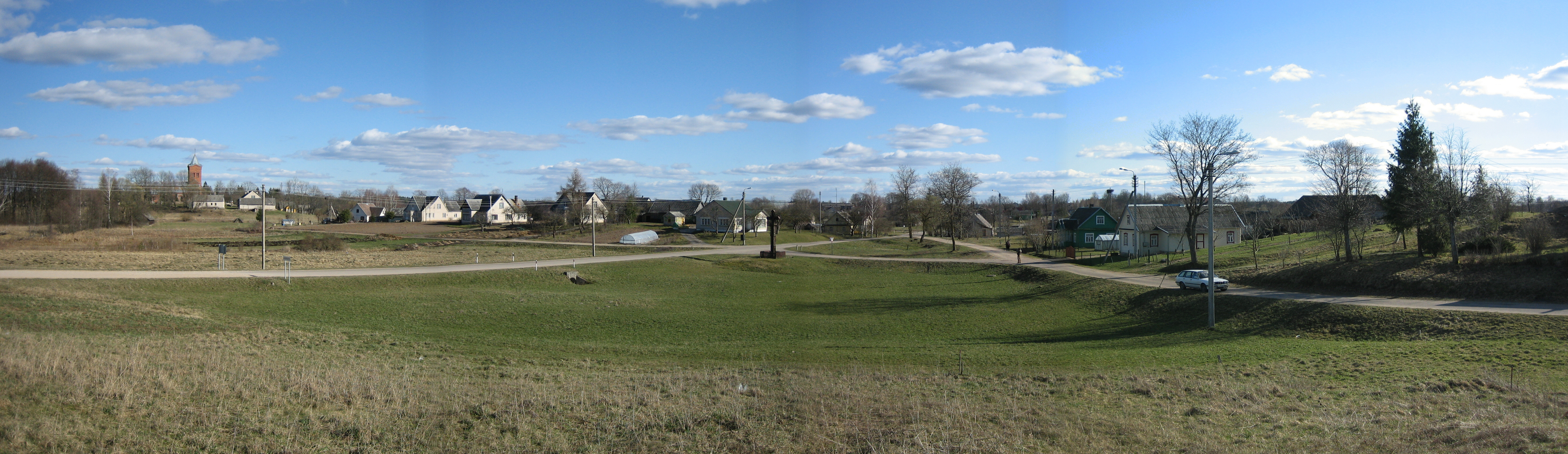 Linkmenys, Ignalinos raj. sav.